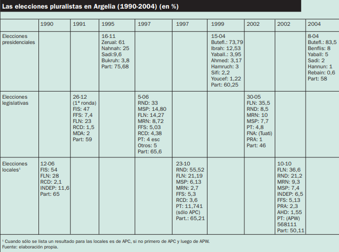 Cuadro resultados elecciones